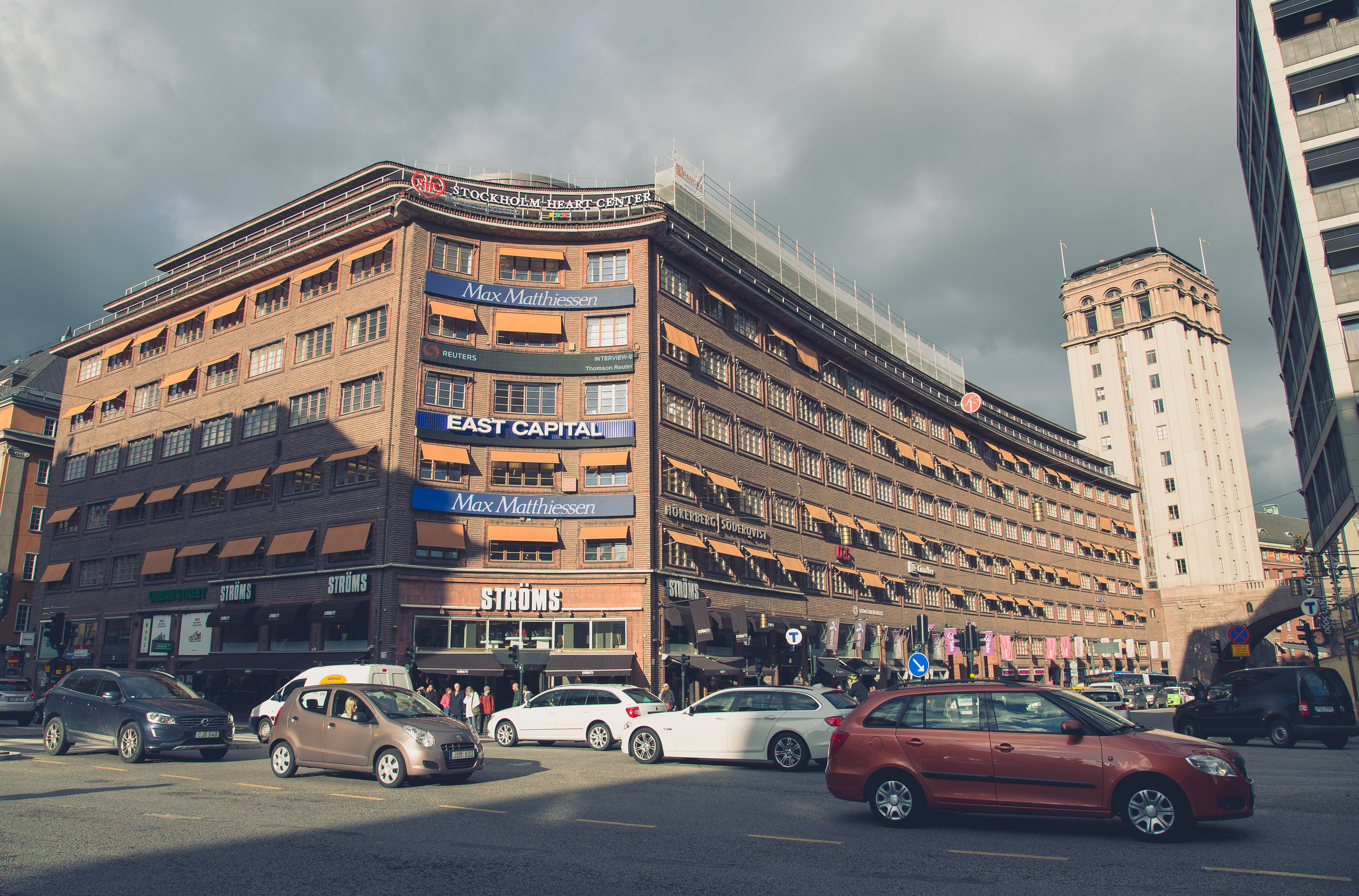 Stockholm, Sweden Licensing